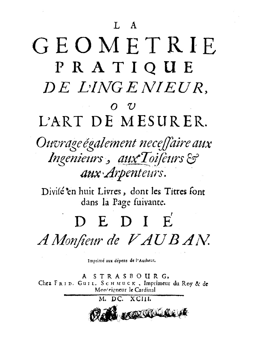 La geometrie pratique de l'ingenieur, ou L'art de mesurer. Ouvrage également necessaire aux ingenieurs, aux toiseurs & aux arpenteurs. Divisé en huit livres, dont les titres sont dans la page suivante. …. - A Strasbourg : chez Frid. Guil. Schmuck, imprimeur du Roy & de monseigneur le Cardinal, 1693. - [16], 272 [i.e. 276] p., 27 c. di tav. ripiegate : ill. calcografiche ; 4º. - Il nome dell'autore si ricava dalla lettera dedicatoria .